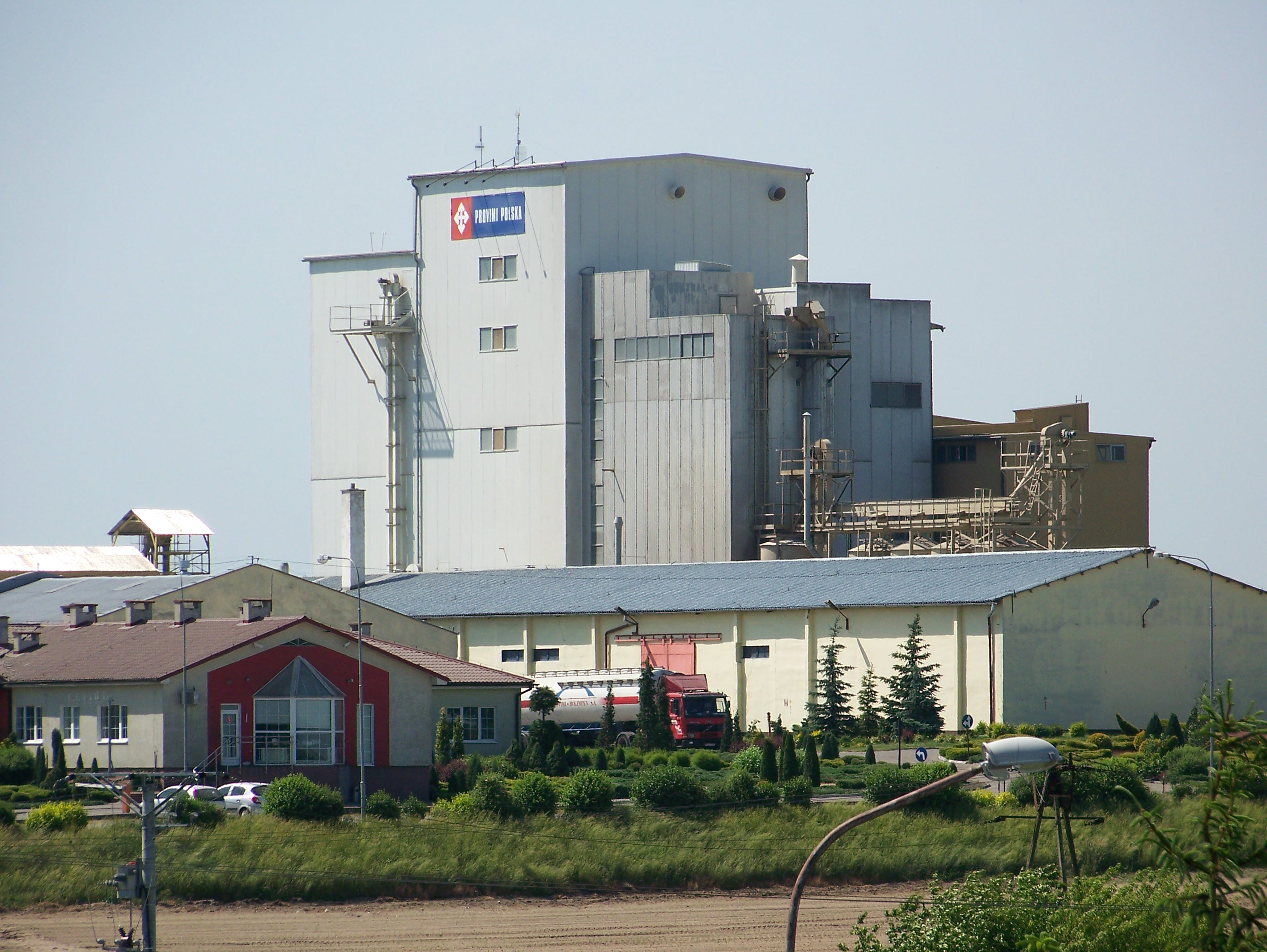 Wytwórnia Pasz w Bieganowie